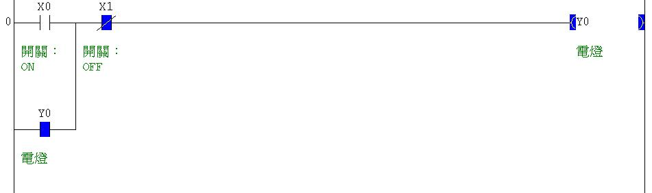 這是我自己編輯的迴路圖，並藉由小畫家擷取下來